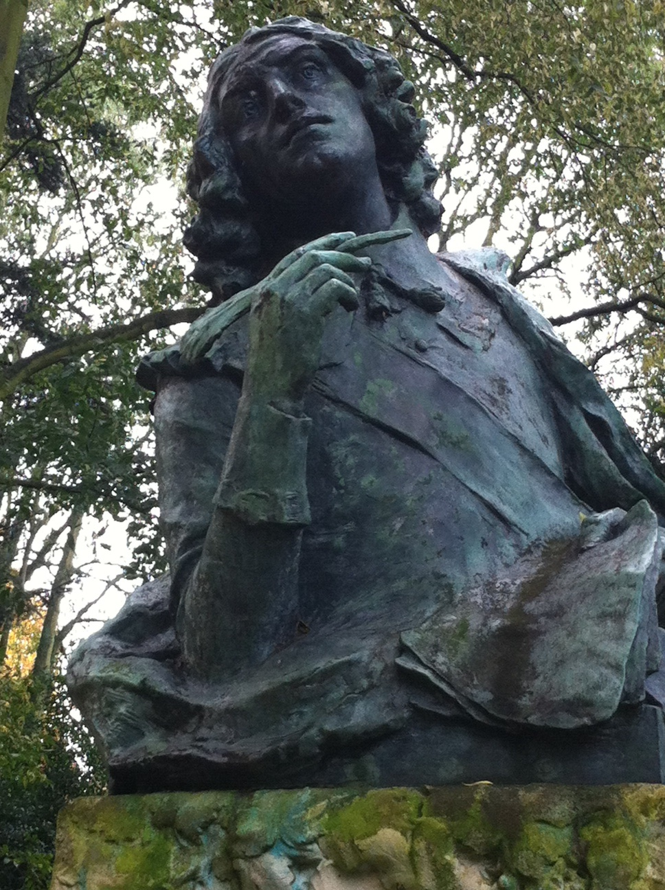 Buste de Racan, sculpté par François Sicard en 1907.